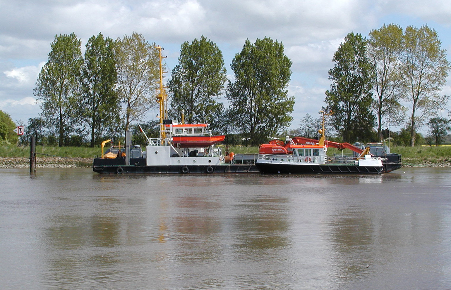 Die Arbeitsschiffe Oste und Mittelgrund vor dem Ostesperrwerk